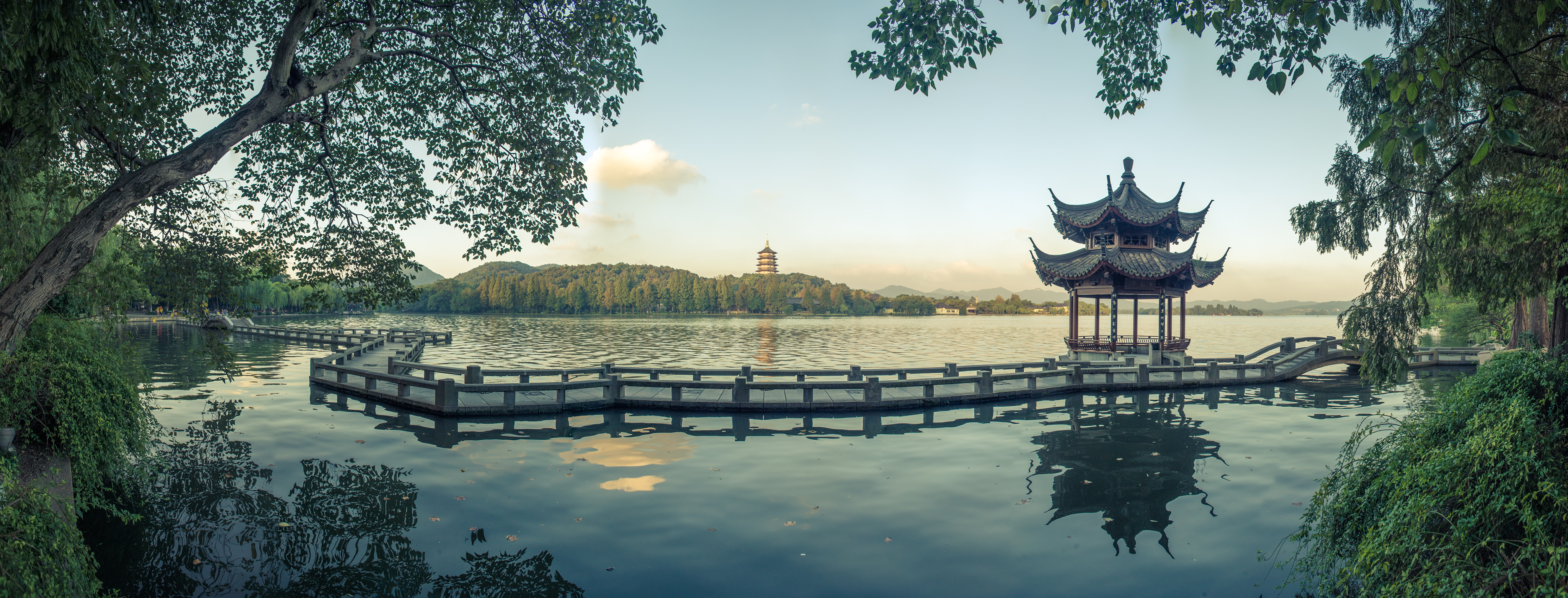 Hangzhou es un pueblito de 9 millones de habitantes con un hermoso lago al centro, lleno de parques y senderos al más puro estilo tradicional chino. Un deleite para pasear en cualquier época del año, excepto en las fiestas en que se satura de turistas nacionales, en especial la muy temida por todo extranjero: semana dorada, en que todo se retaca, los precios suben al cielo y pasear por sus jardines se convierte en algo como la imposible tarea de transbordar en el metro Pantitlán en hora pico. Ante eso y la imposibilidad de conseguir transporte u hospedaje a cualquier otro lado, pasé una semana despertando a las 4:30 am y disfrutando la ciudad antes de que llegaran las hordas, un gran placer.